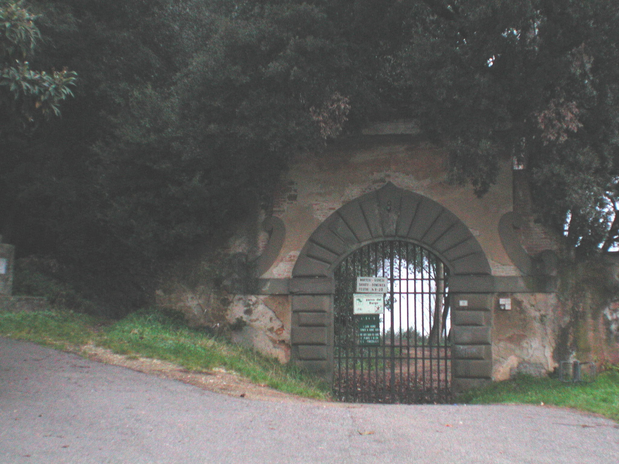 Porta ovest del barghetto di Bonistallo as Poggio a Caiano